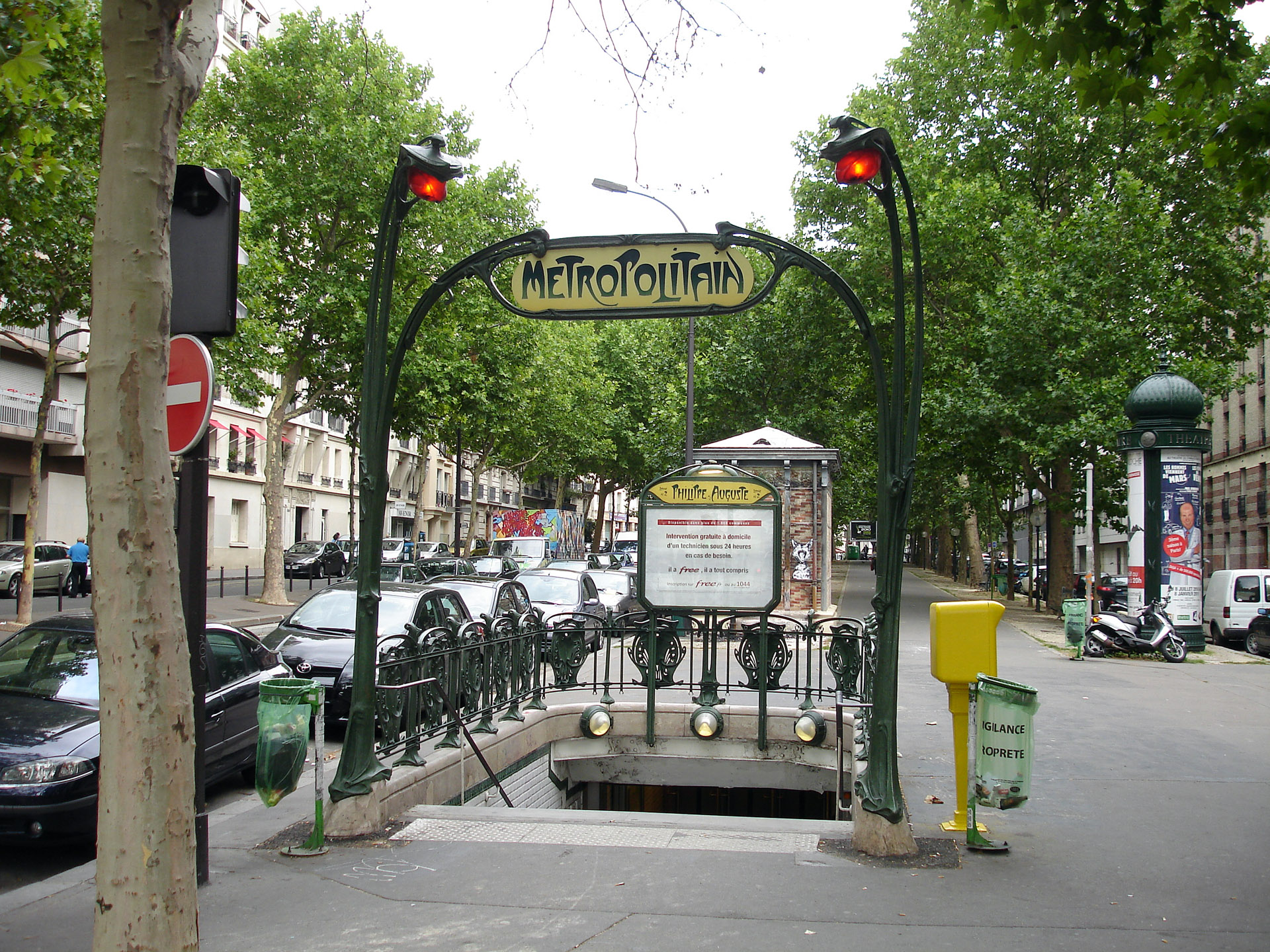 La station Philippe Auguste de la ligne 2 du métro de Paris, France